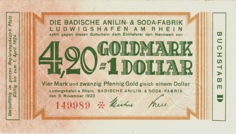 Notgeldschein 4,20 Goldmark (1,00 US-Dollar), "Anilin-Dollar" genannt [1]